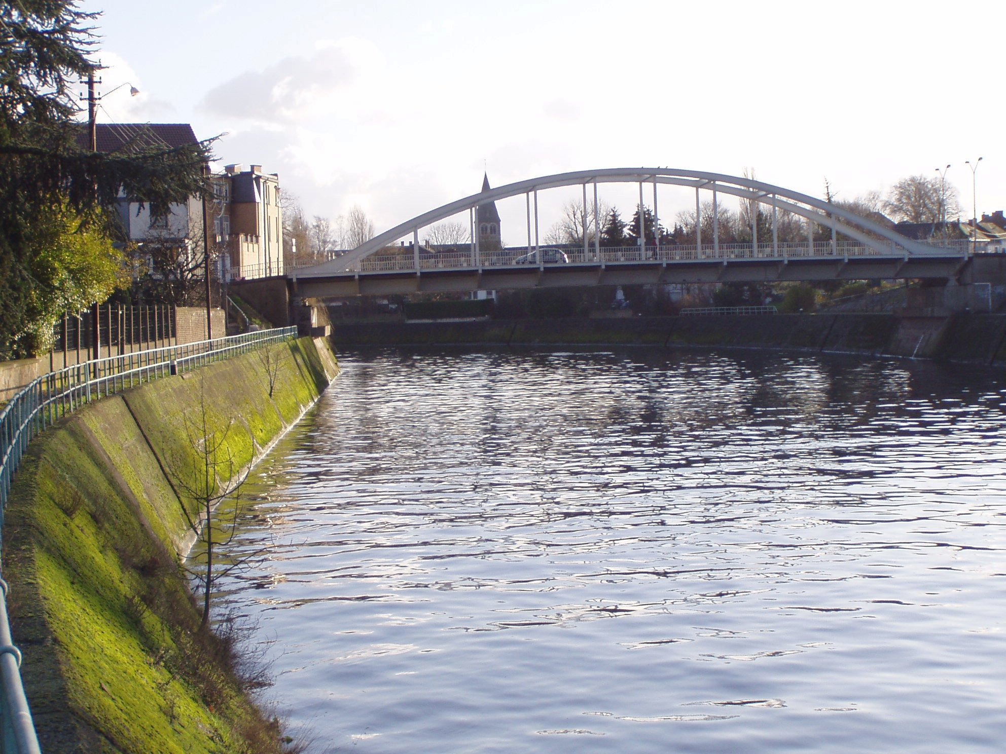 Le pont de Sambre, rue Félix Protin à Auvelais, depuis le sentier vers la rue de la Larronnerie (rive gauche, amont du pont)